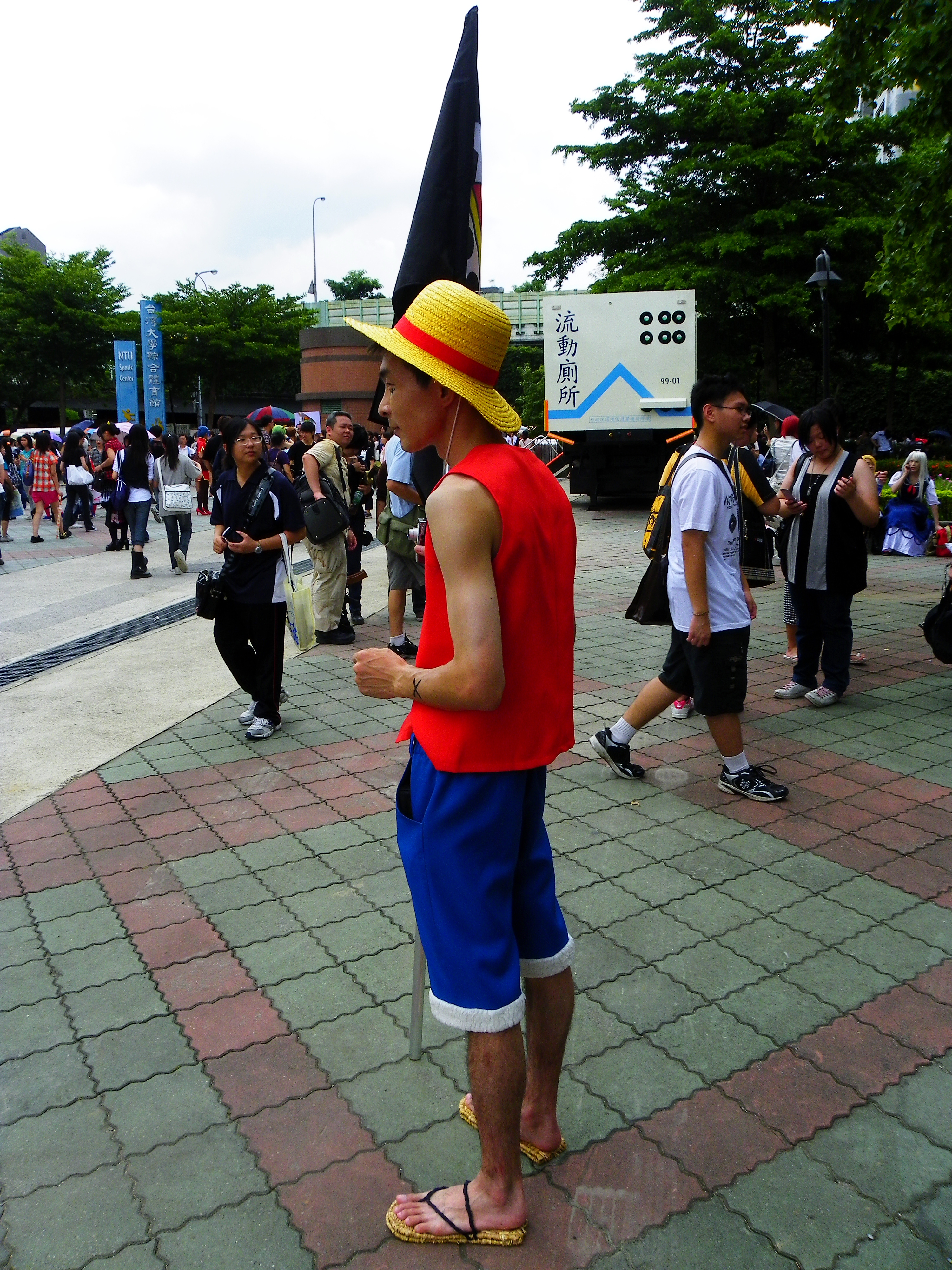 CWT28臺大體育場外，手持骷髏旗的魯夫Cosplayer。